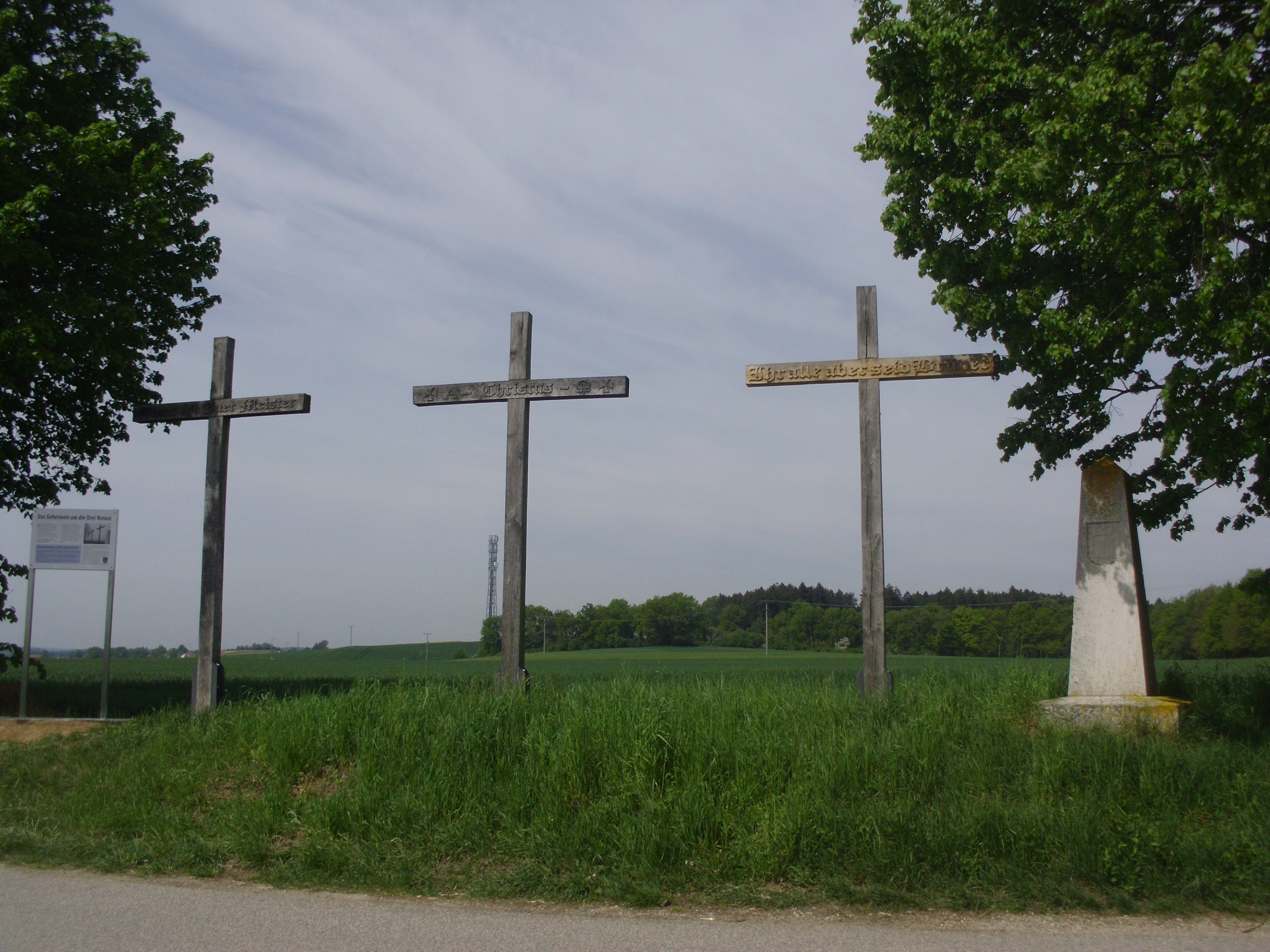 Flurdenkmal "Drei Kreuze" bei Eitensheim im oberbayerischen Landkreis Eichstätt